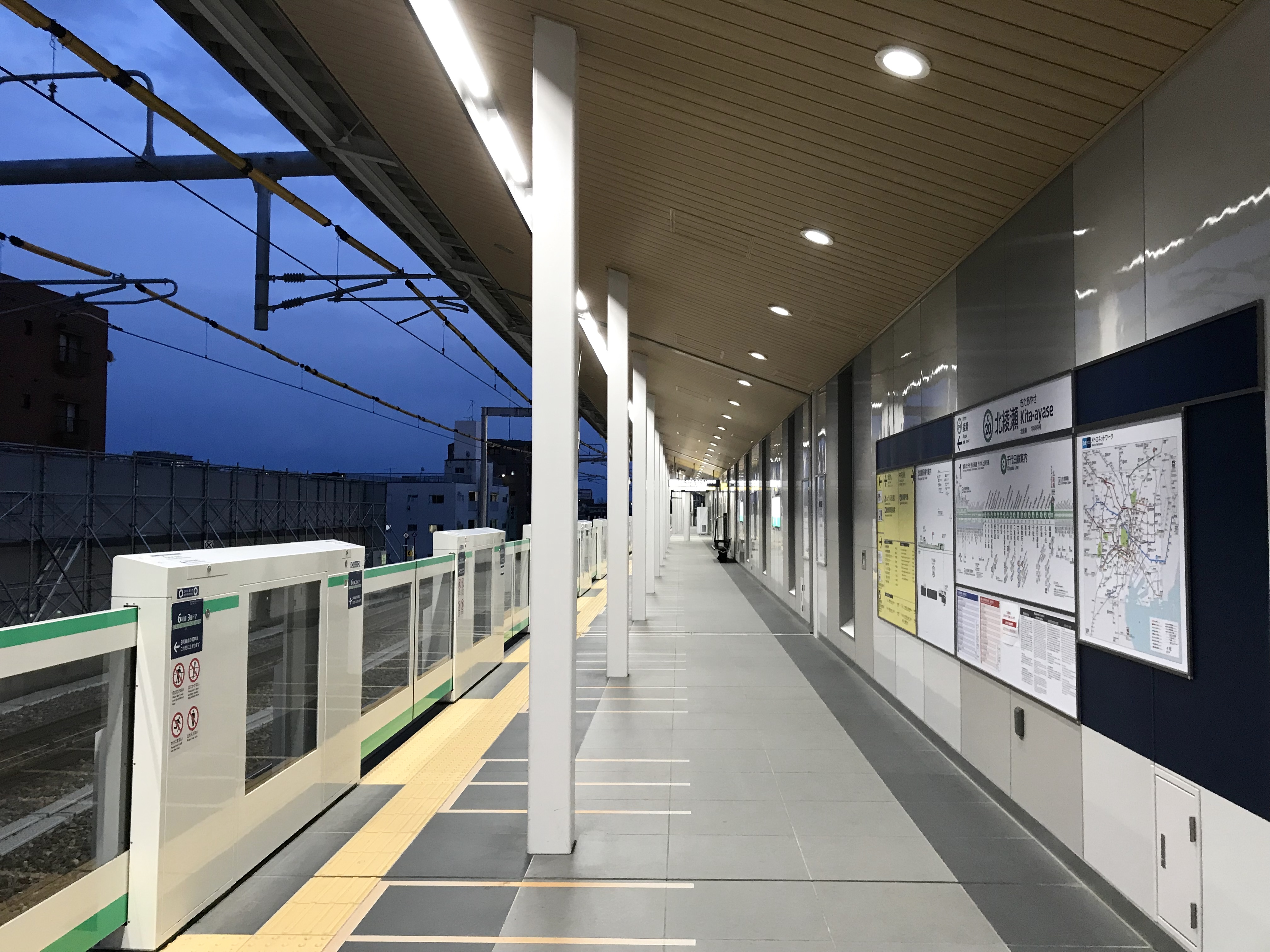 東京メトロ千代田線北綾瀬駅1番線ホーム